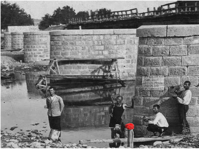 Строителство на Черния мост, град Фердинанд (Монтана), 1932 г.